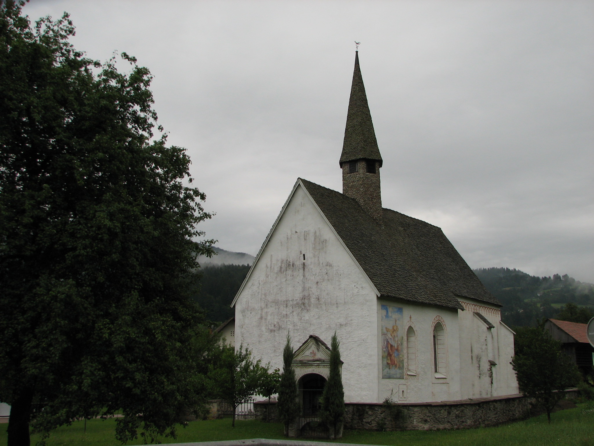 Cerkev Svetega Ahaca, Mislinja